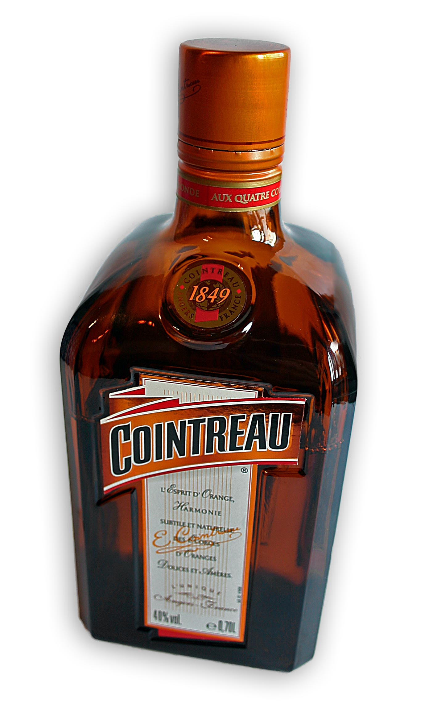 Bottle of france liqueur Cointreau